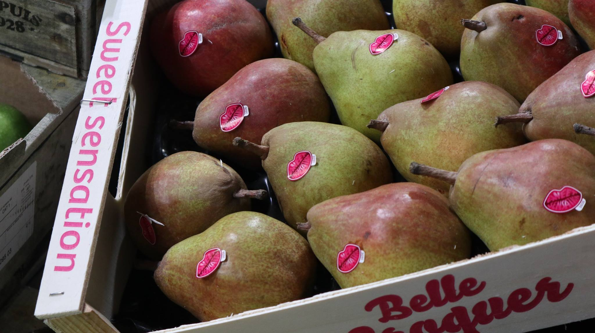 Fantasii se meze v žádném případě nekladou, důkazem jsou pouliční tržiště v Londýně, kde je umožněno mladým umělcům a designérům být součástí kreativní komunity